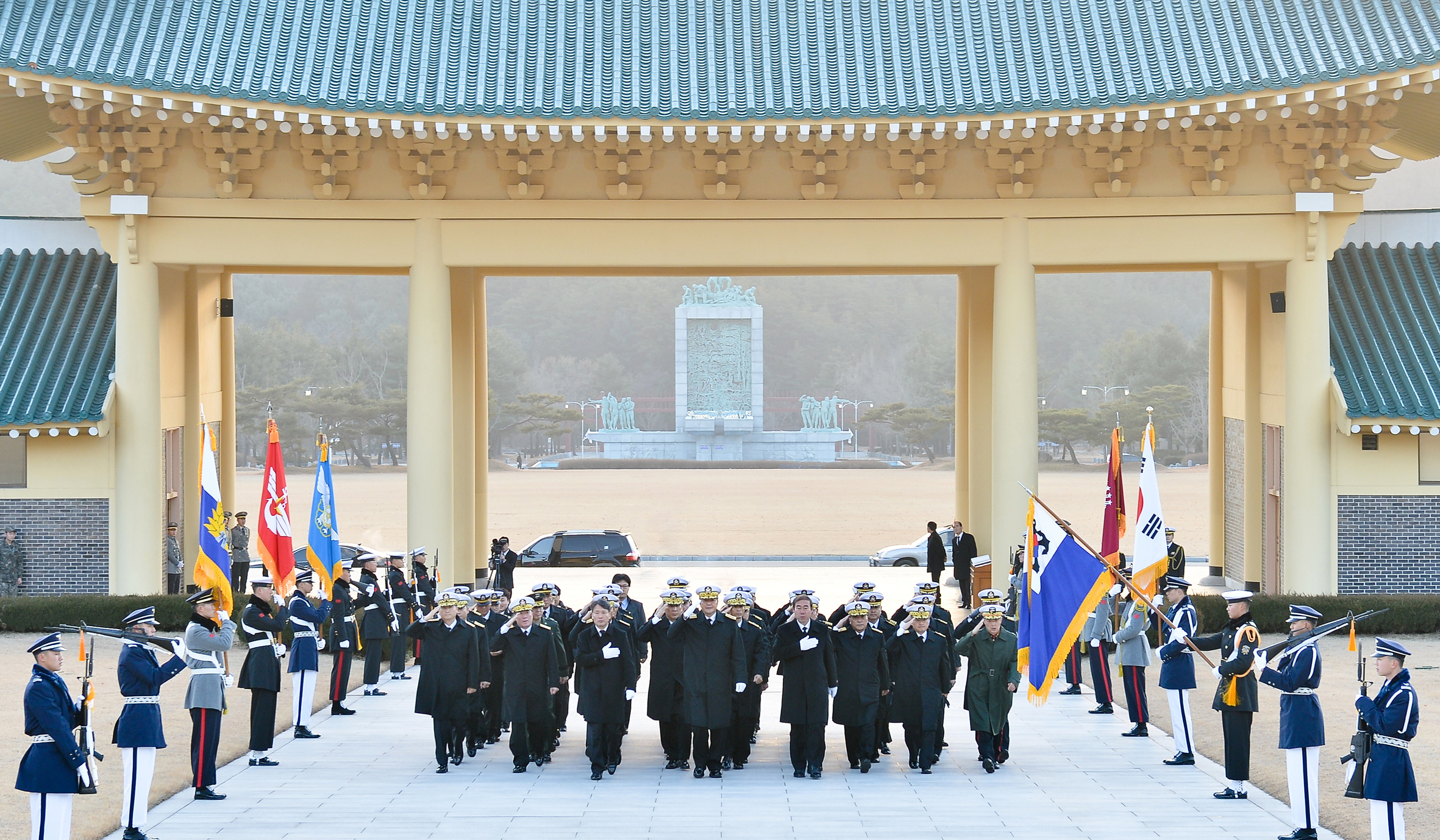 '14.1.1. 해군은 대전현충원 및 창원시 진해구 충혼탑등에서 신년 참배를 실시하였고 필승해군 결의대회를 거행하였다 촬영자 : 김태훈